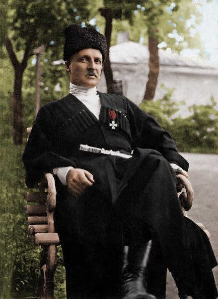 A colorized picture of hetman Pavlo Skoropadsky by Ruslan Habanets